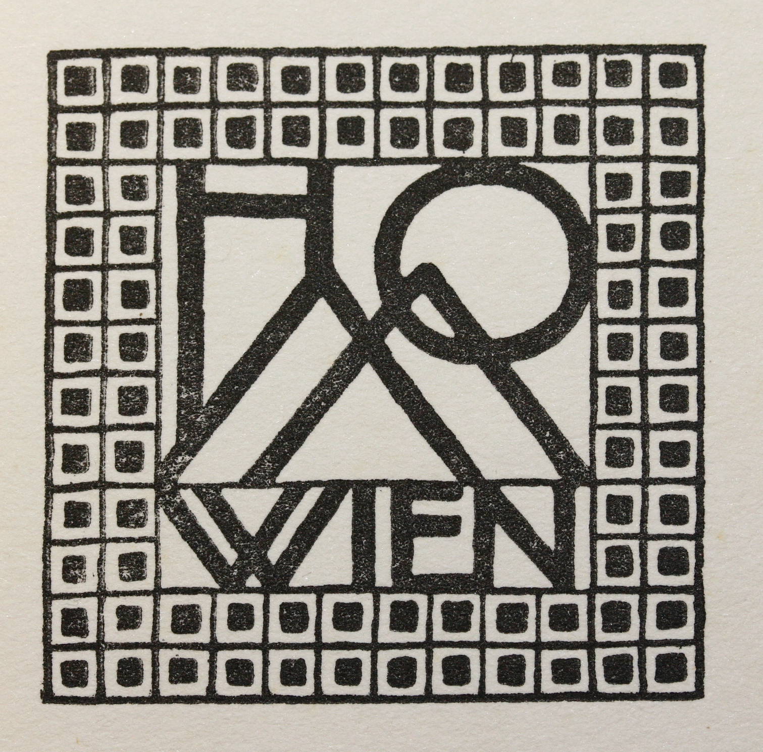 Wappen bzw. Logo der Galerie Miethke in Wien